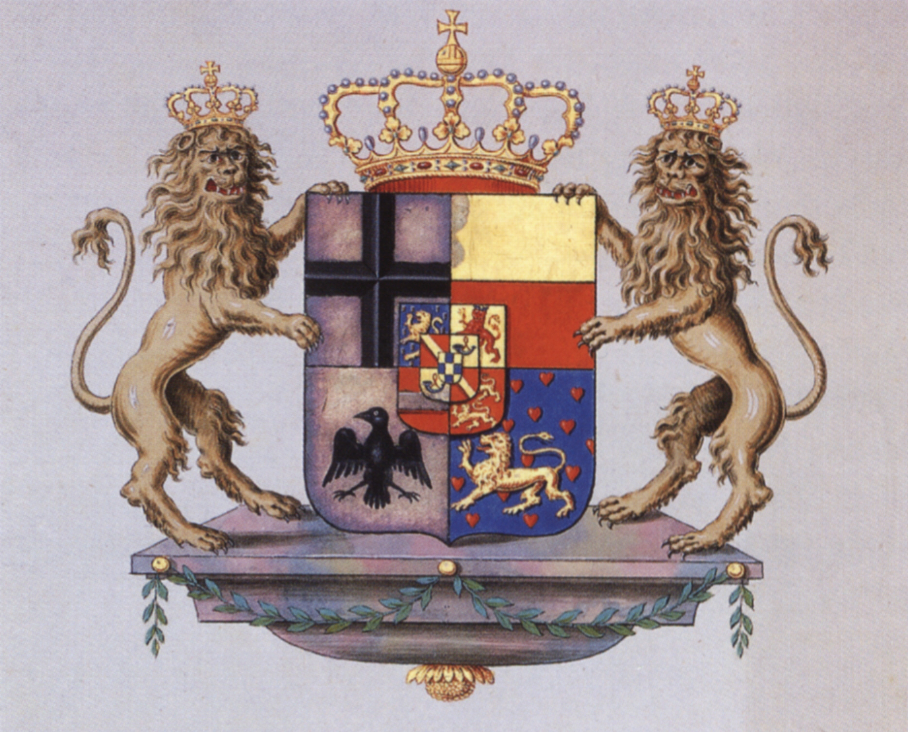 Wappen des Fürstentums Oranien-Nassau-Fulda nach den Säkularisationsgewinnen 1802–1806; Den Haag, Koninklijk Huisarchief Feld 1: Fürstentum Fulda Feld 2: Fürstentum Corvey Feld 3: Grafschaft Dortmund Feld 4: Herrschaft Weingarten (Kanzleiwappen des Reichsstifts Weingarten)